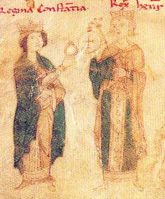 Konstancie Sicilská s jIndřichem VI. Štaufským